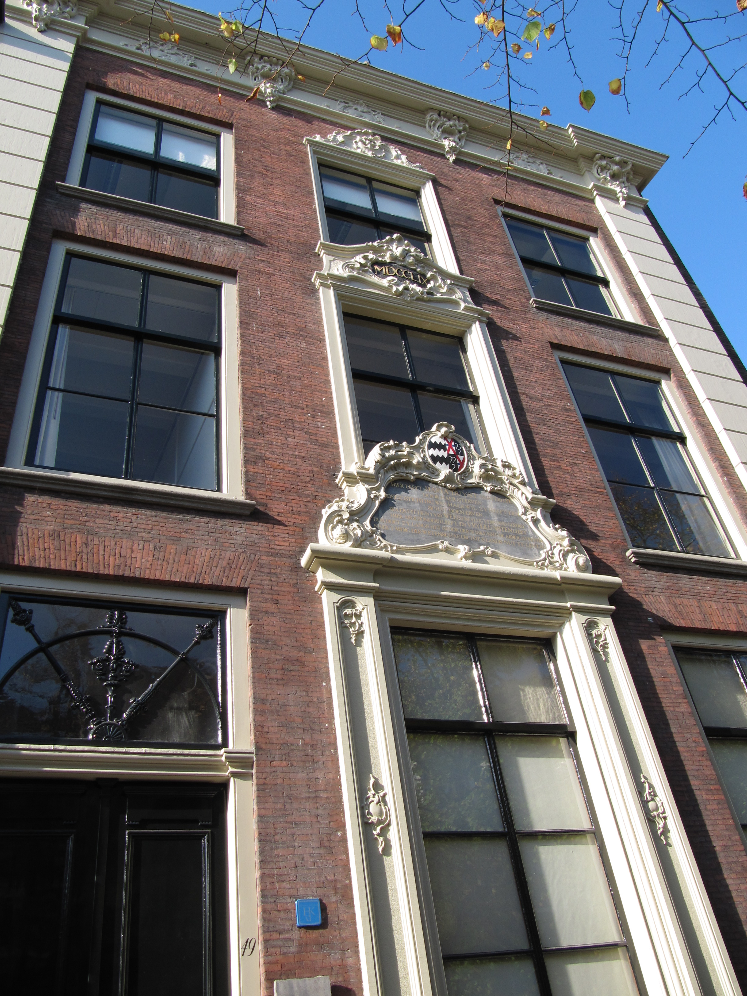 RM11985 Delft - Oude Delft 49.jpg